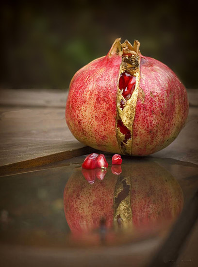 Punica granatum, reflejo.